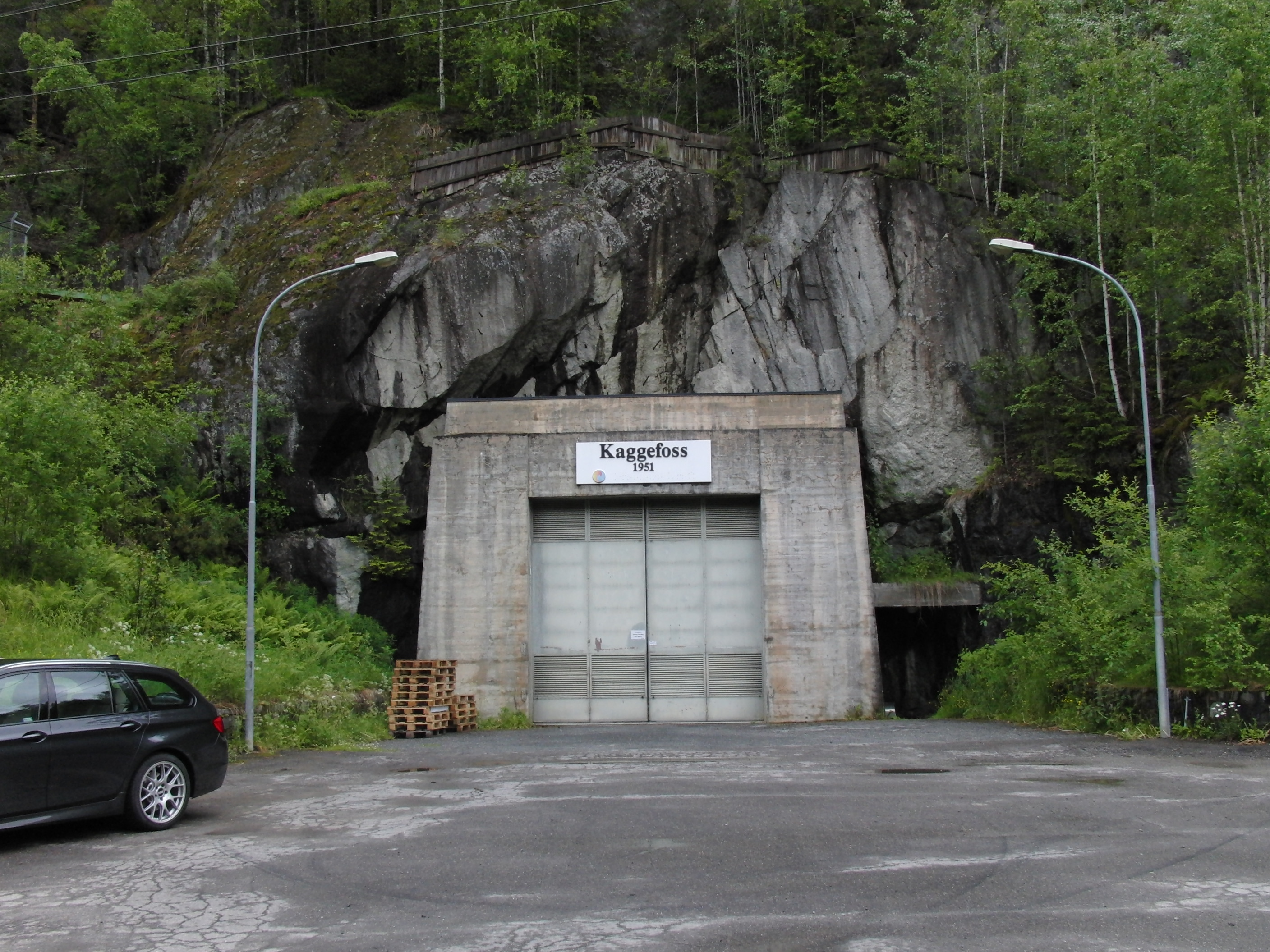 Kaggefoss kraftstasjon